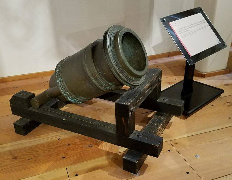 ハンス・ヴォルフガング・ブラウンが作成した臼砲のレプリカ